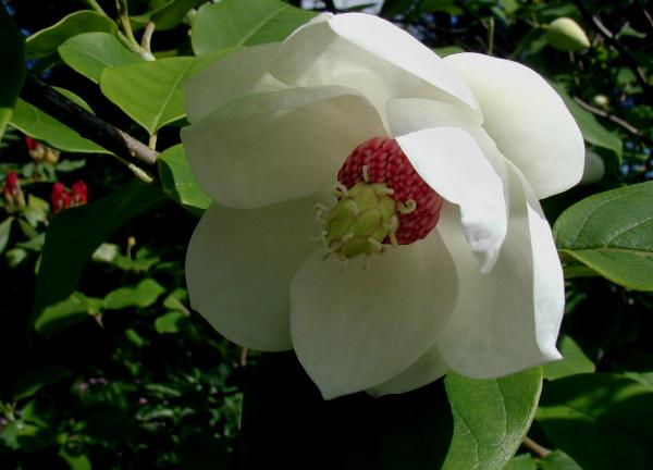 Magnolia sieboldii: Flower.